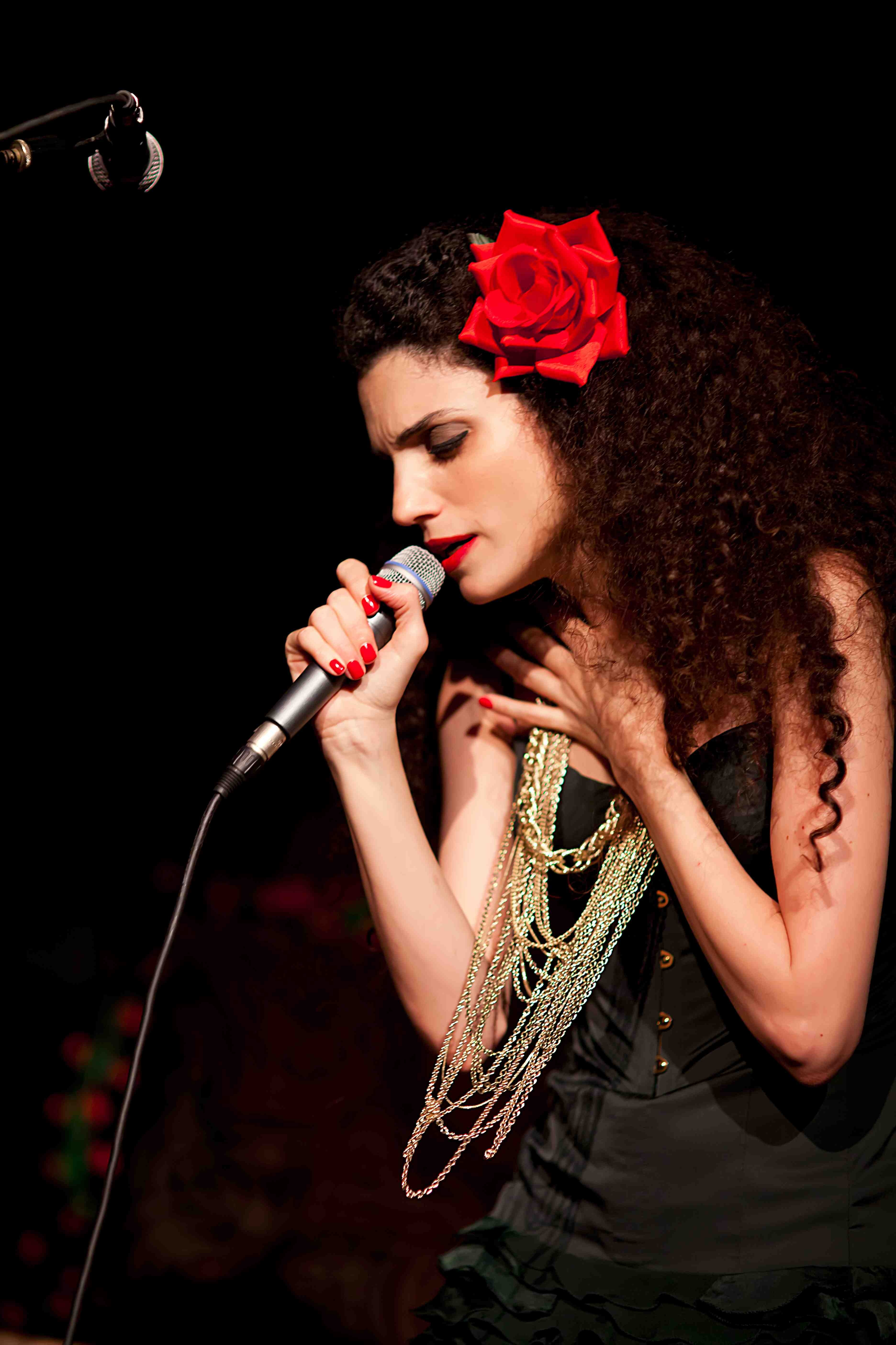 יעל בדש בהופעה ב"אזור - The Zone" תל אביב 2012